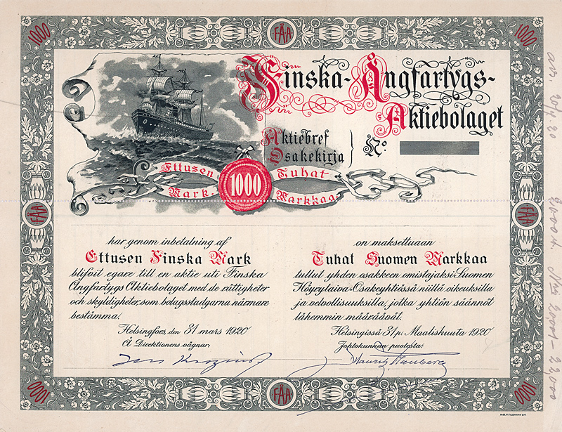 Aktienblankette über 1000 Fmk der Finska Angfartygs AB vom 31. März 1920